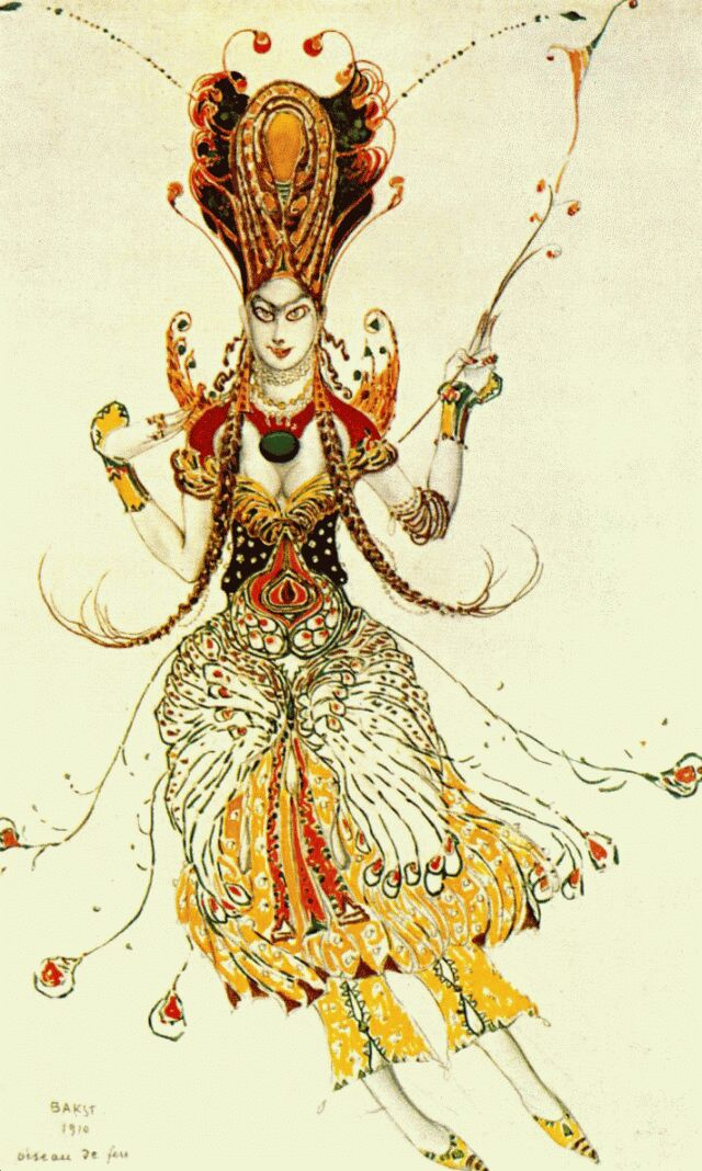 Эскиз костюма *Жар-Птицы* И.Стравинского. 1910